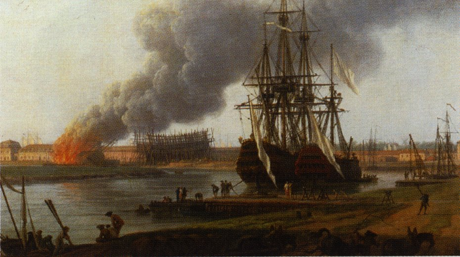 detail